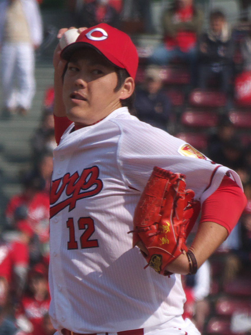 広島東洋カープ九里亜蓮